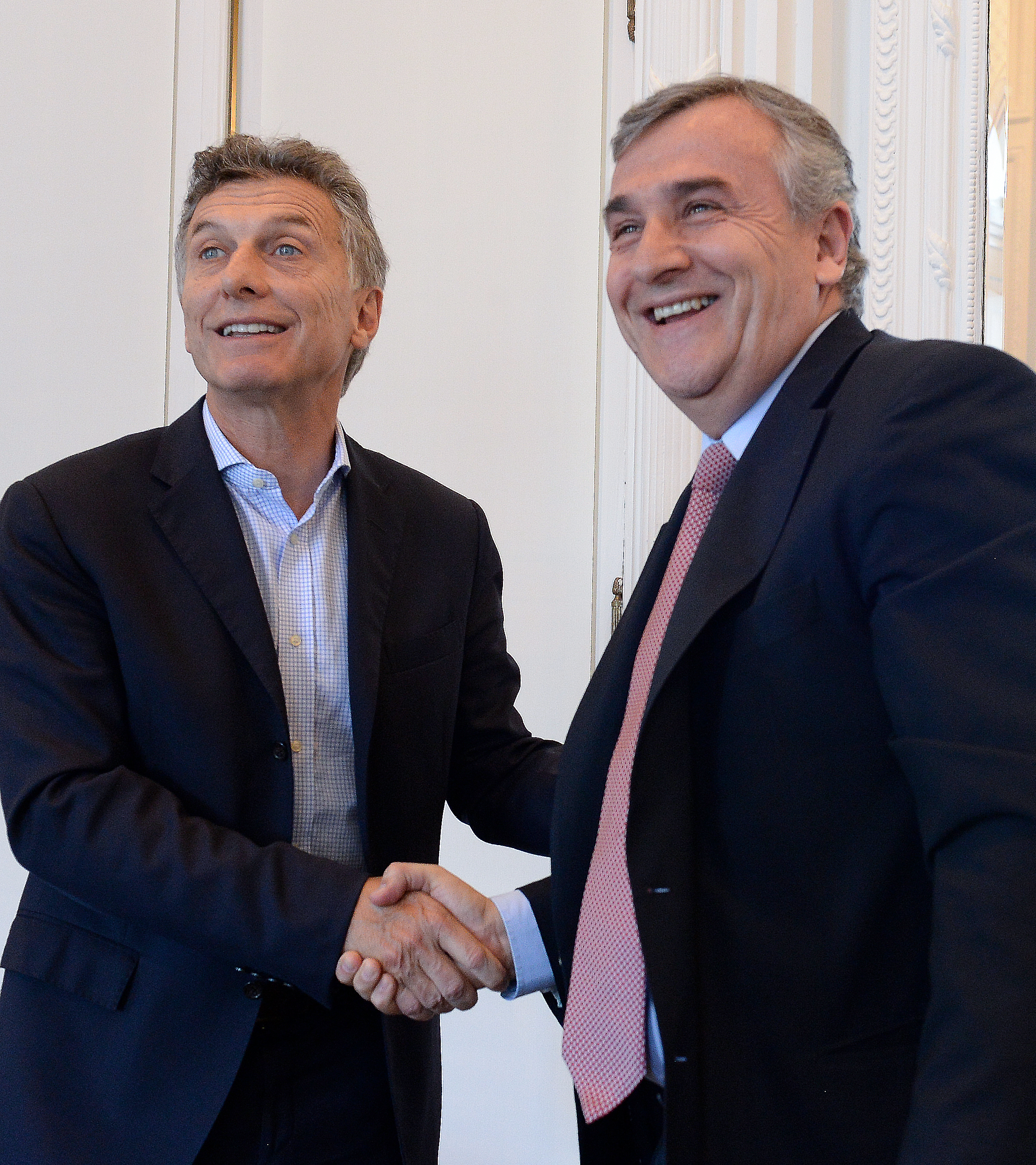 El presidente Mauricio Macri recibió hoy al gobernador de Jujuy, Gerardo Morales, en Casa de Gobierno.